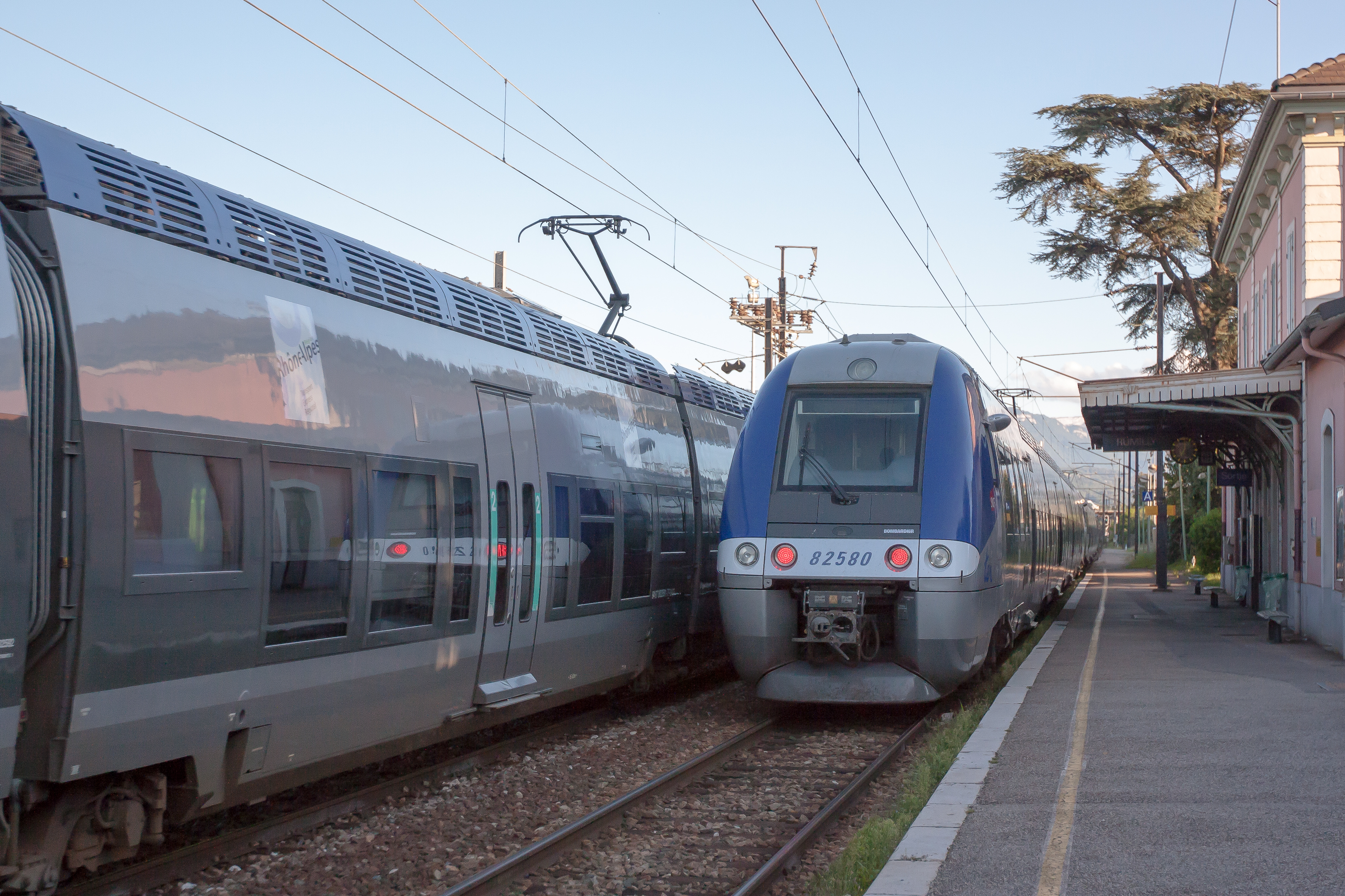 Rame B 82500 en gare de Rumilly / Rumilly / Haute-Savoie / France